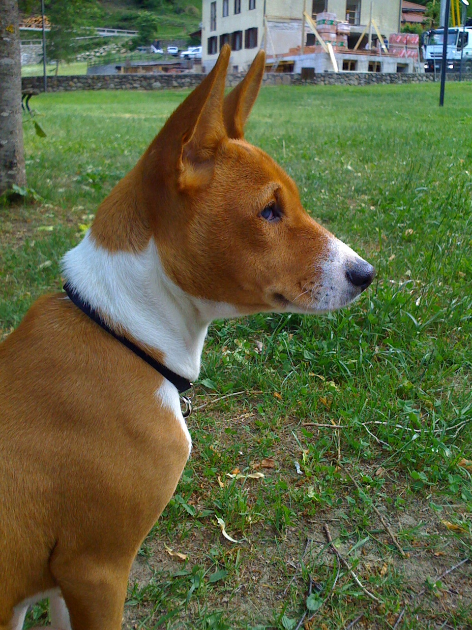 Esemplare maschio di Basenji, primo piano